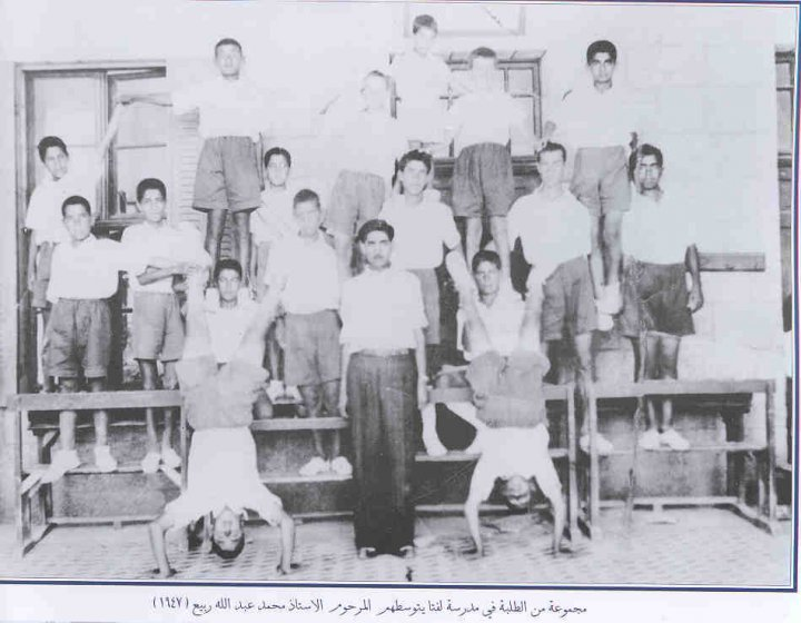 بعض الطلاب من مدرسة لفتا